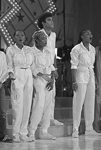 Boney M zingt We kill the world in het Nederlandse televisieprogramma Showbizzquiz in 1981